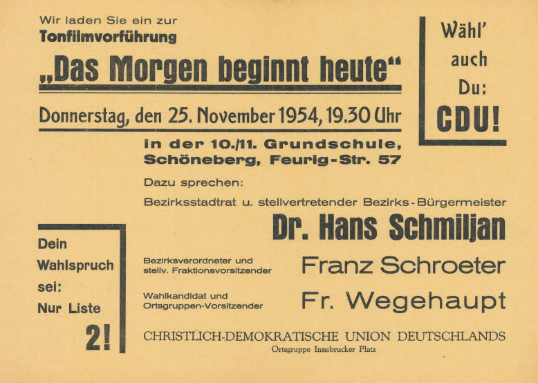 Wir laden Sie ein zur Tonfilmvorführung "Das Morgen beginnt heute" ... Wähl' auch Du: CDU ... Dazu sprechen: Bezirksstadtrat u. stellvertretender Bezirks-Bürgermeister Dr. Hans Schmiljan Bezirksverordneter und stellv. Fraktionsvorsitzender Franz Schroeter Wahlkandidat und Ortsgruppen-Vorsitzender Fr. Wegehaupt Dein Wahlspruch sei: Nur Liste 2! Christlich-Demokratische Union Deutschlands Ortsgruppe Innsbrucker Platz Plakatart: Ankündigungsplakat Auftraggeber: CDU-Ortsgruppe Innsbrucker Platz Objekt-Signatur: 10-004 : 154 Bestand: Plakate zu Abgeordnetenhauswahlen Berlin (10-004) GliederungBestand10-18: Plakate zu Abgeordnetenhauswahlen Berlin (10-004) » CDU Lizenz: KAS/ACDP 10-004 : 154 CC-BY-SA 3.0 DE